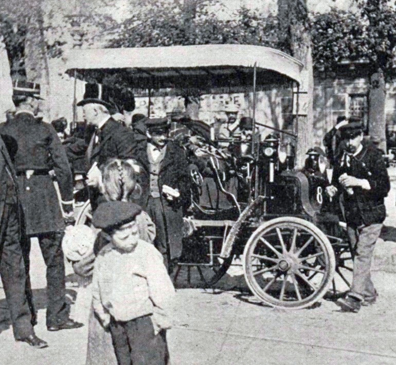 Panhard & Levassor numéro 8 de Merkel (2e), Paris-Marseille-Paris 1896 avant le départ - Le Sport universel illustré du 15 octobre 1896, p.314-316